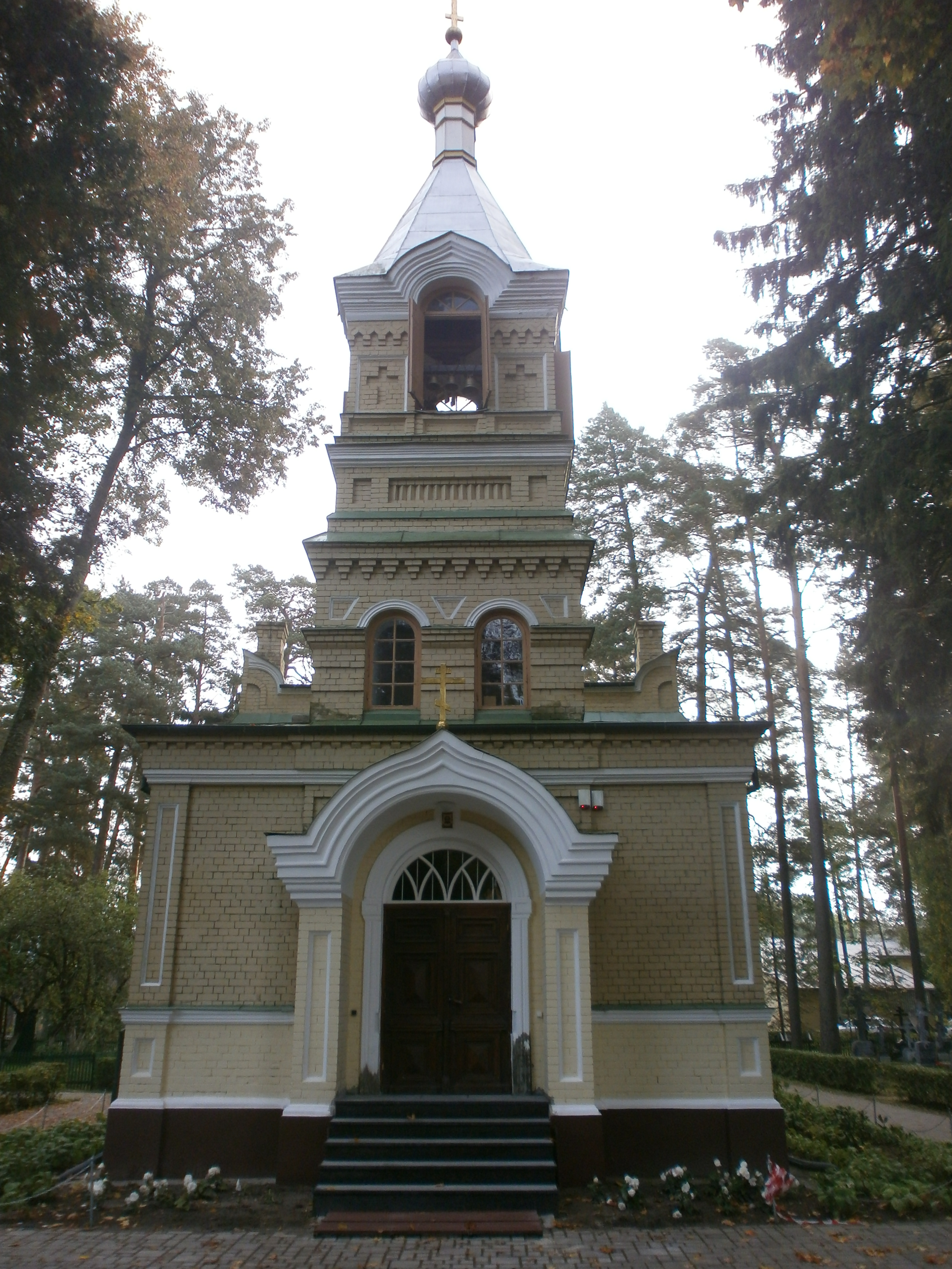 Kristus apskaidrošanās pareizticīgo baznīca, Valgunde